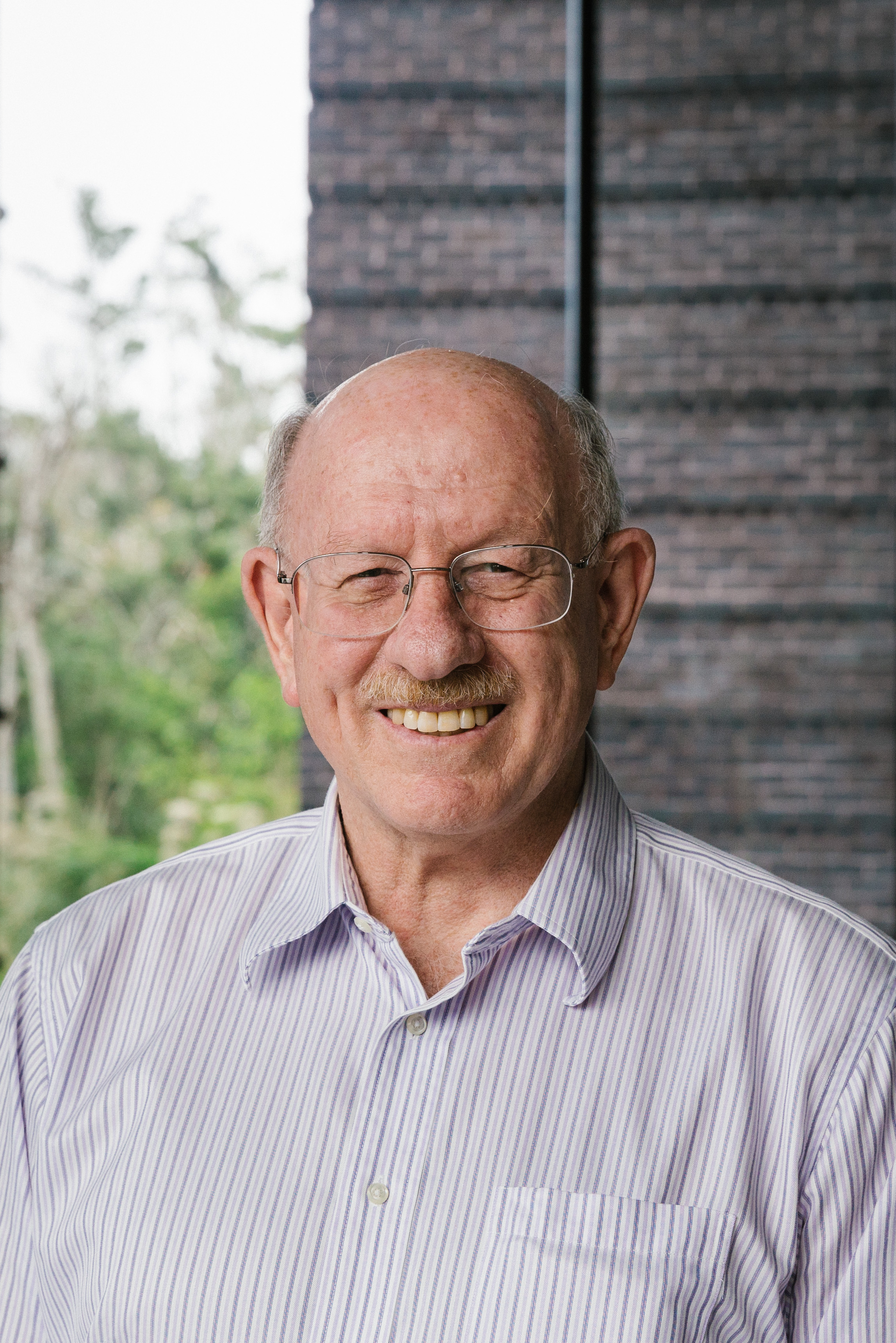 ã¸ã§ããµã³ã»ãã¼ãã¡ã³, åä»£å-¦é·